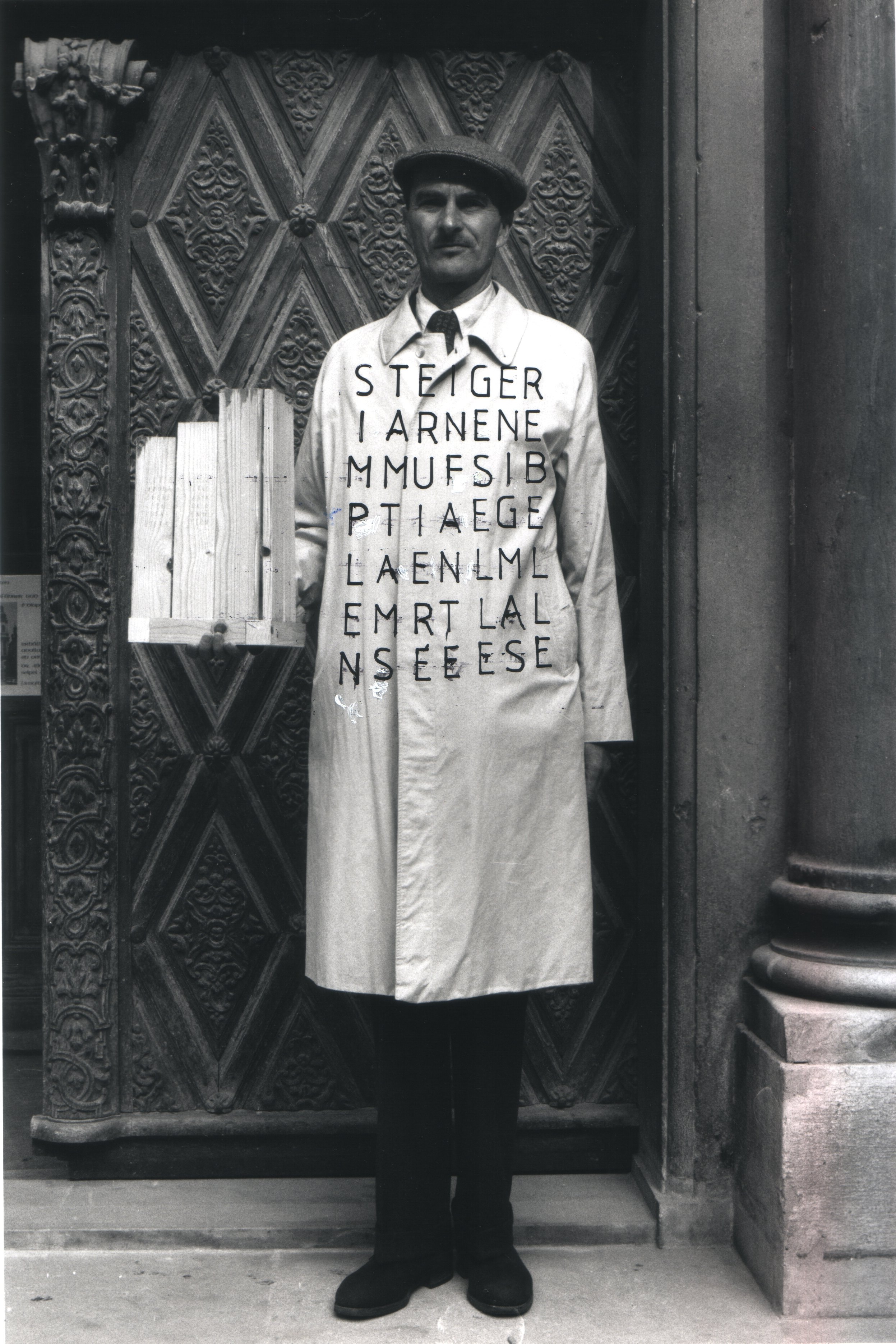 Dominik Steiger LETTERFALL Permanent Marker, Deckweiß auf S/W-Fotografie, Foto: Heidi Harsieber